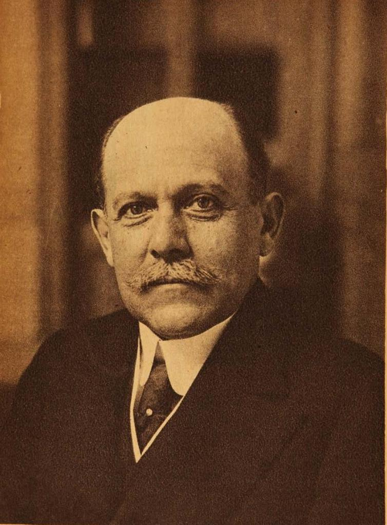 Eliodoro Yáñez Ponce de León, (6 de mayo de 1860 - 26 de julio de 1932). Fue un periodista, abogado y político chileno destacándose sus aportes al país en materiales laborales, educacionales y fue uno de los fundadores del diario La Nación.